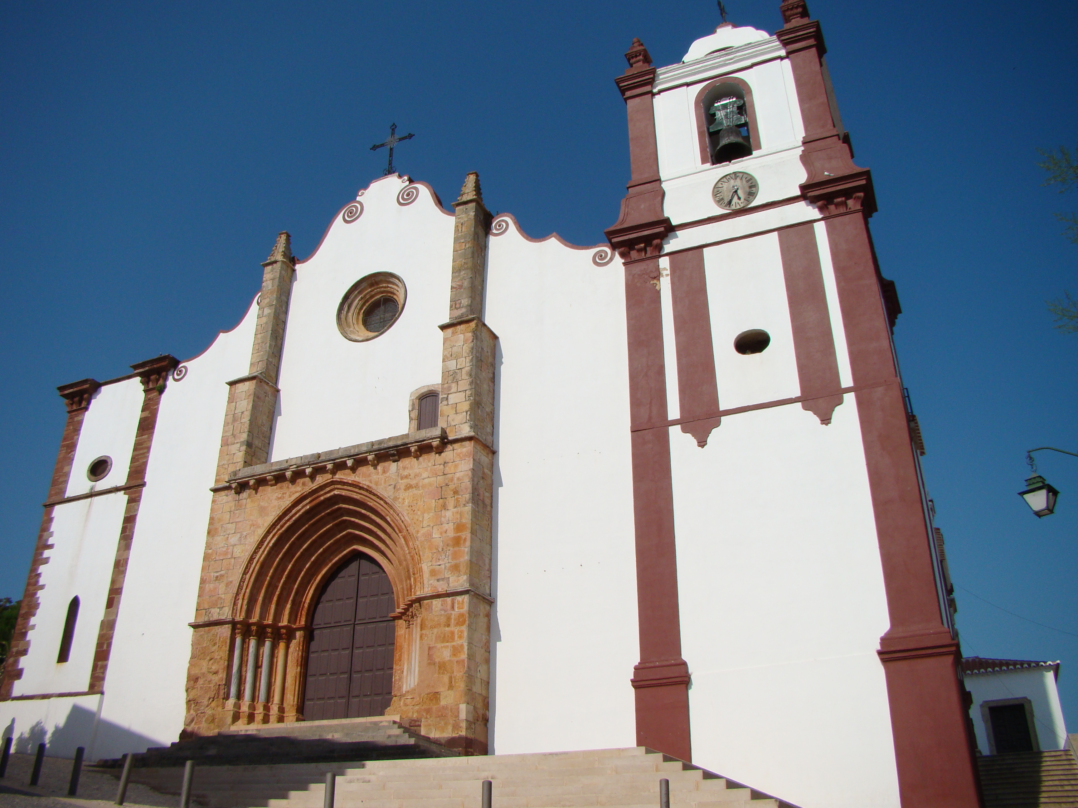 Catedral de Silves